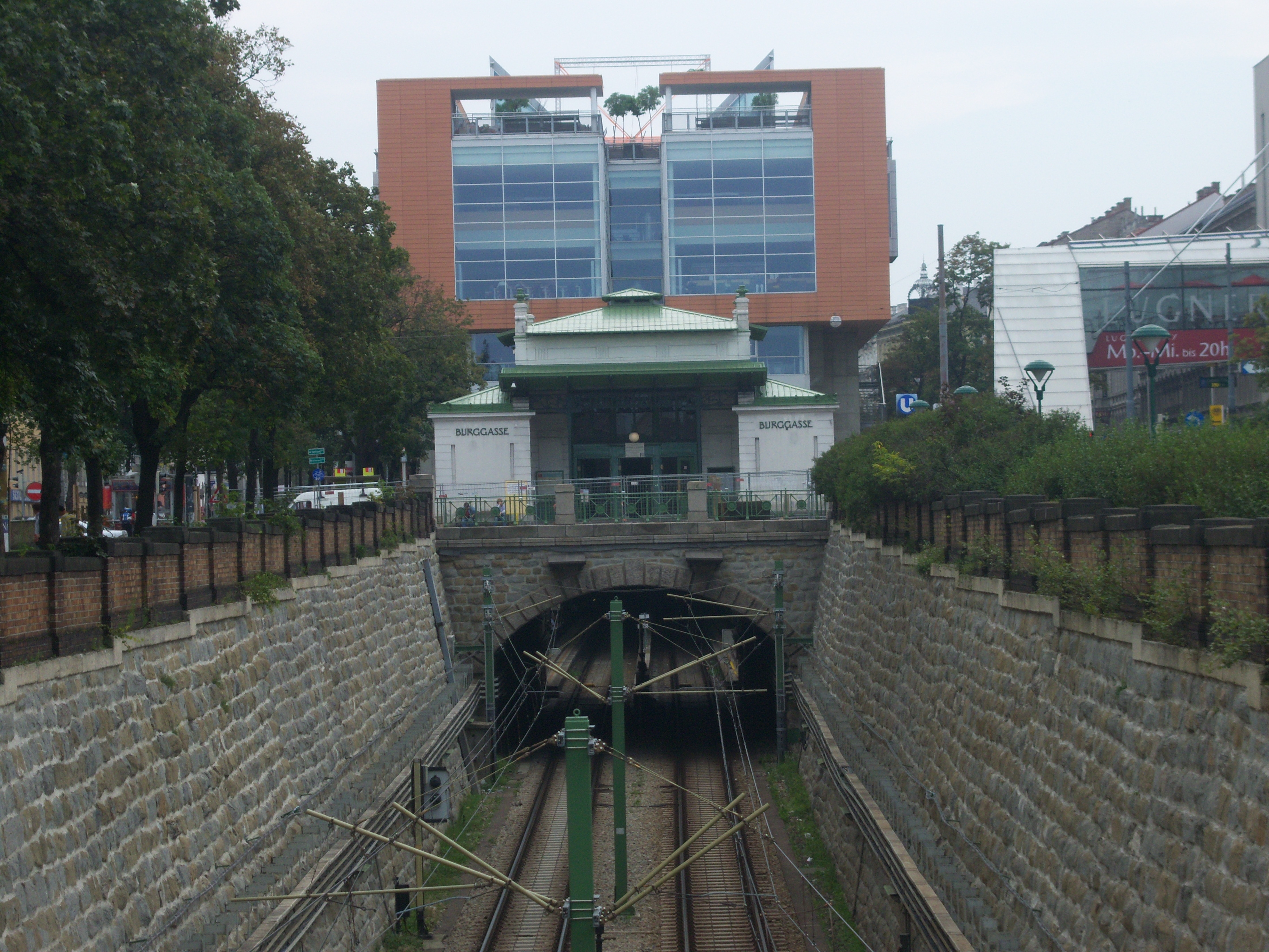 U-Bahn-Station Burggasse-Stadthalle